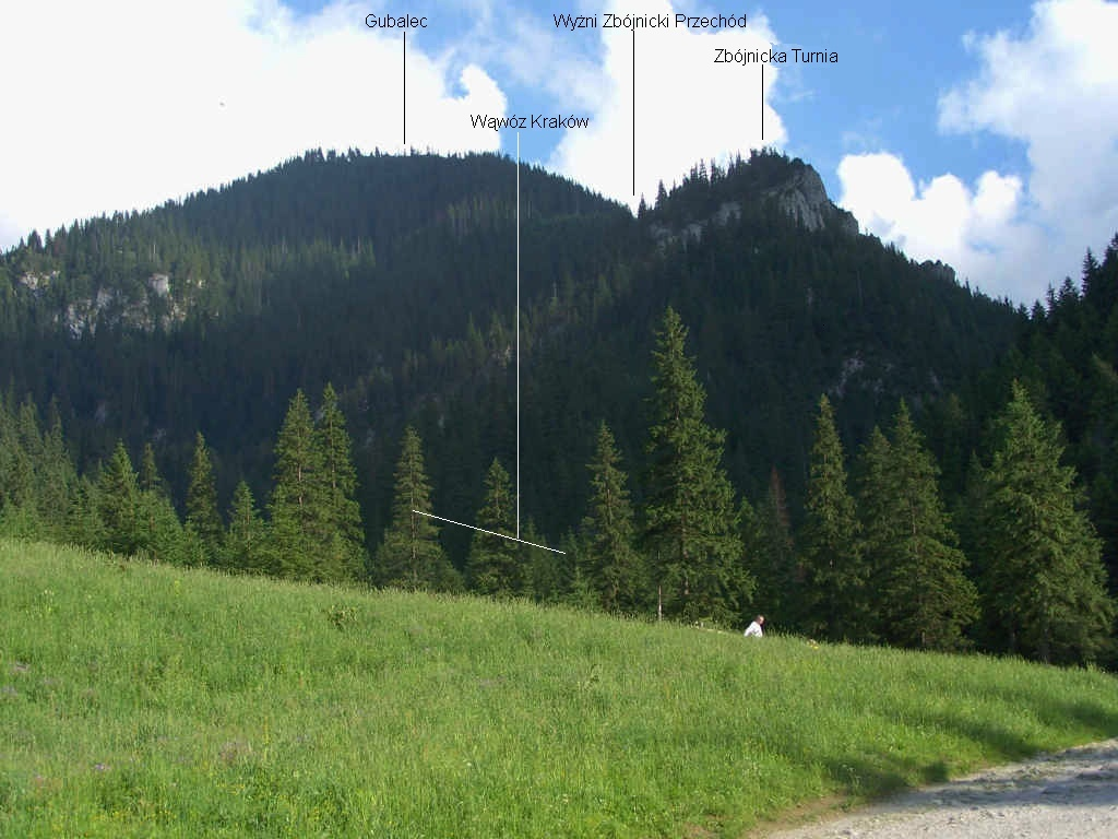 Widok z Polany Pisanej